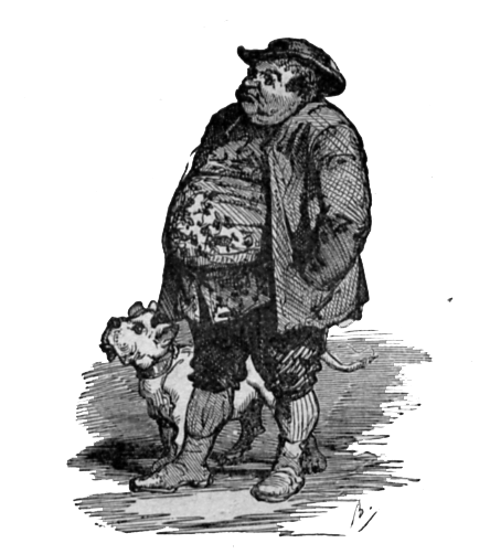 Pour la source voir : Discuter:Contes d'Andersen Vignettes de Bertall illustrant le conte Le Compagnon de voyage : le boucher et son chien.